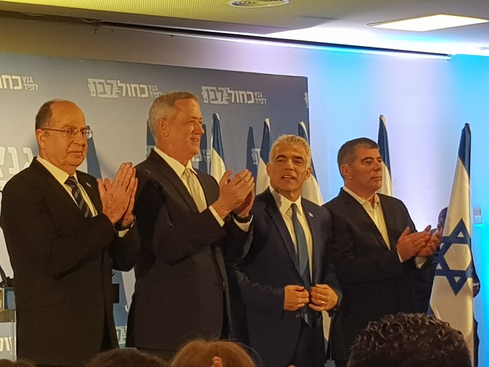 מסיבת עיתונאים, מפלגת כחול לבן, בוגי יעלון וגבי אשכנזי, יאיר לפיד ובני גנץ